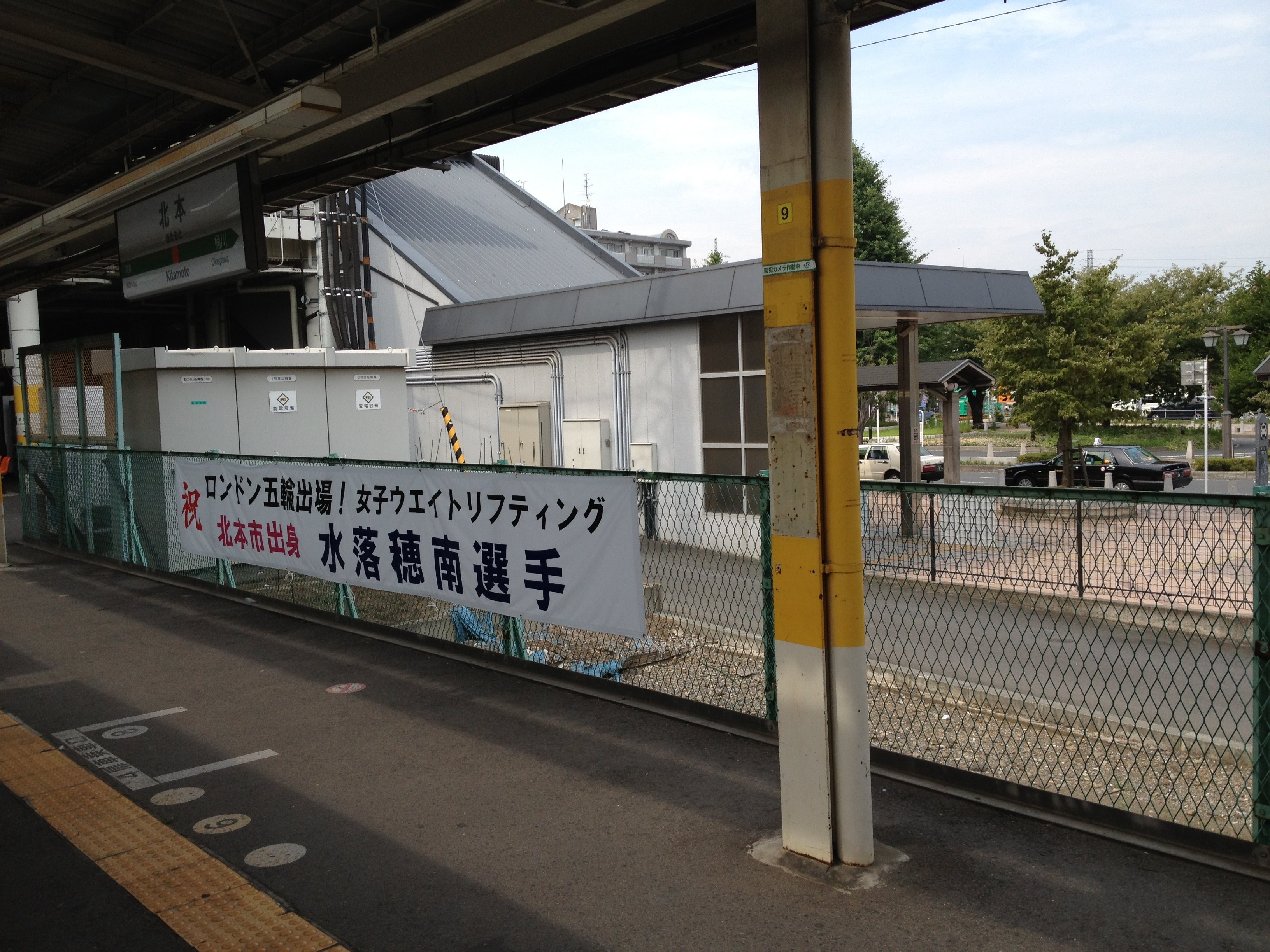 Masaru Kamikura by iPhone